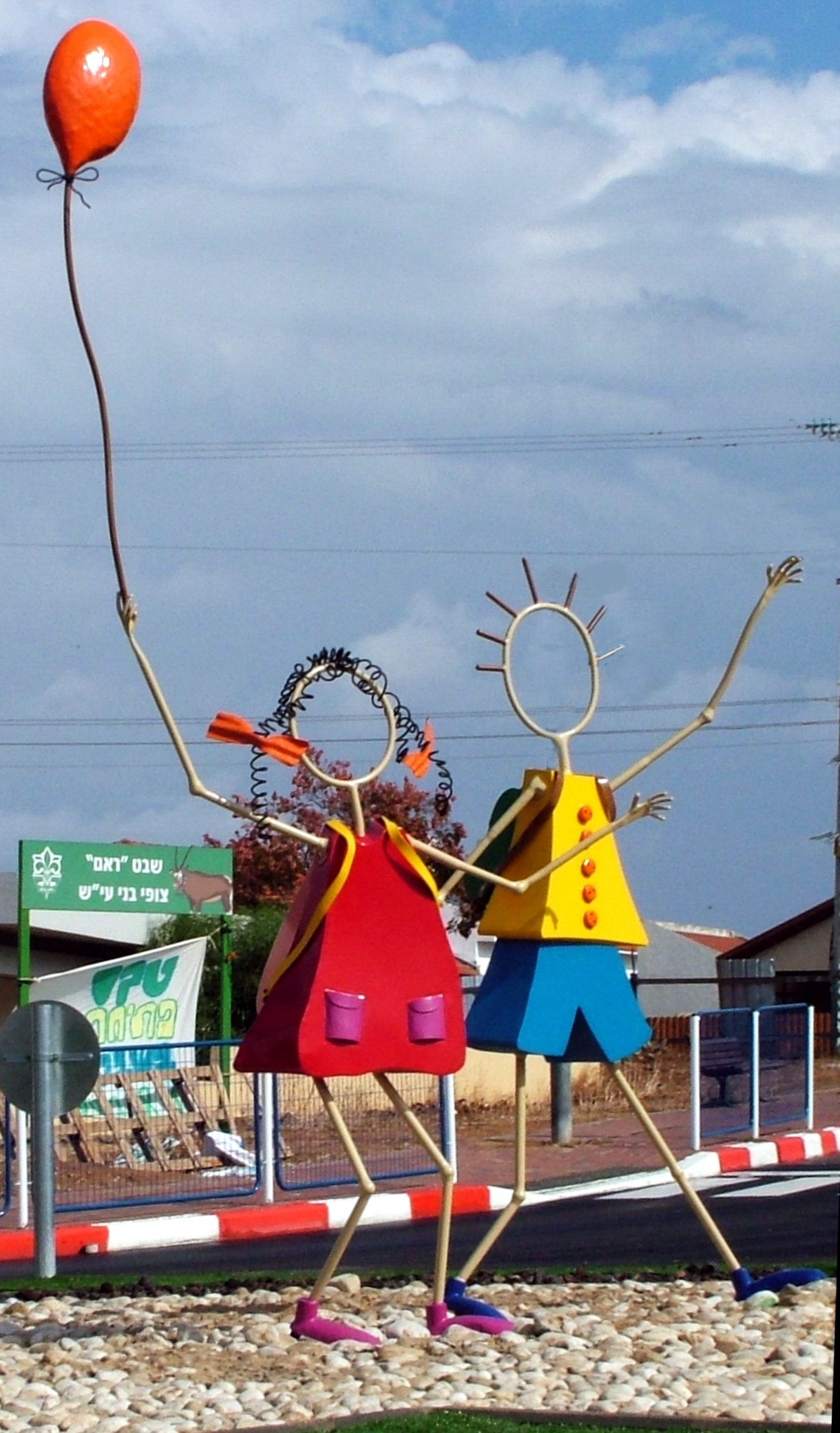 . 200 עבודת ברזל בנפחים פסל: ישראל פרימו. ס"מ